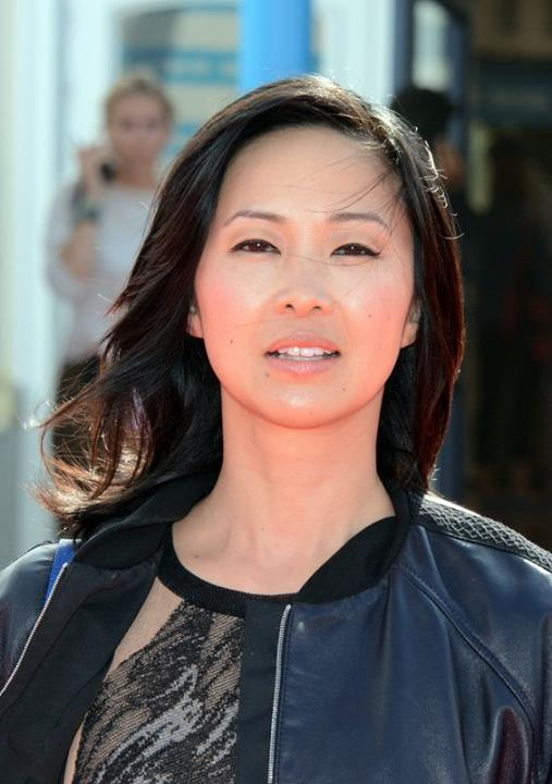 Linh Dan Pham au festival de Deauville